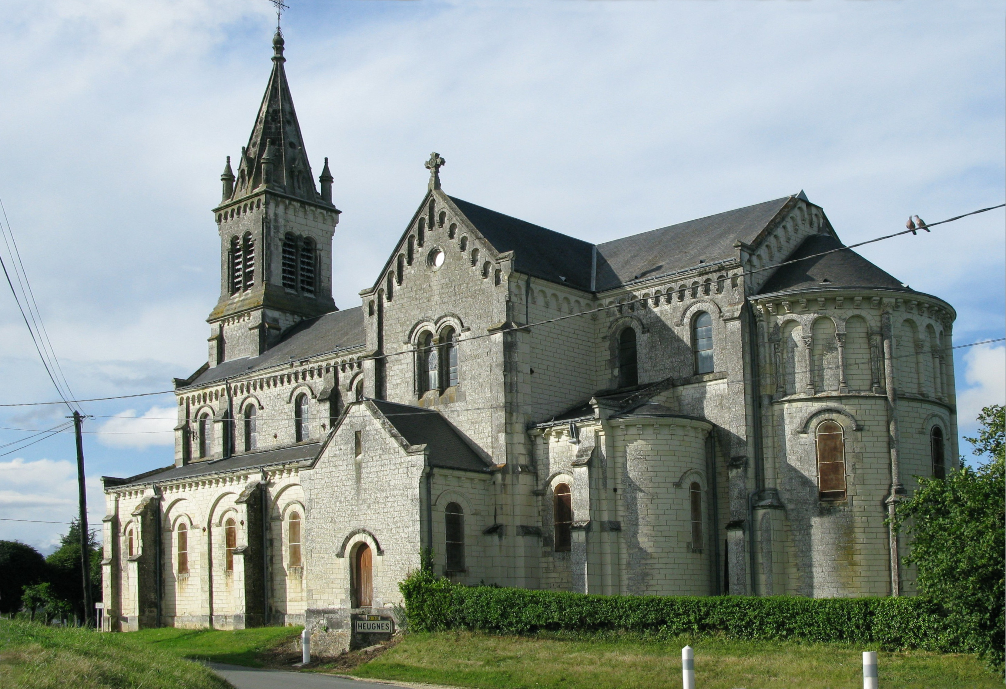 L'église d'heugnes